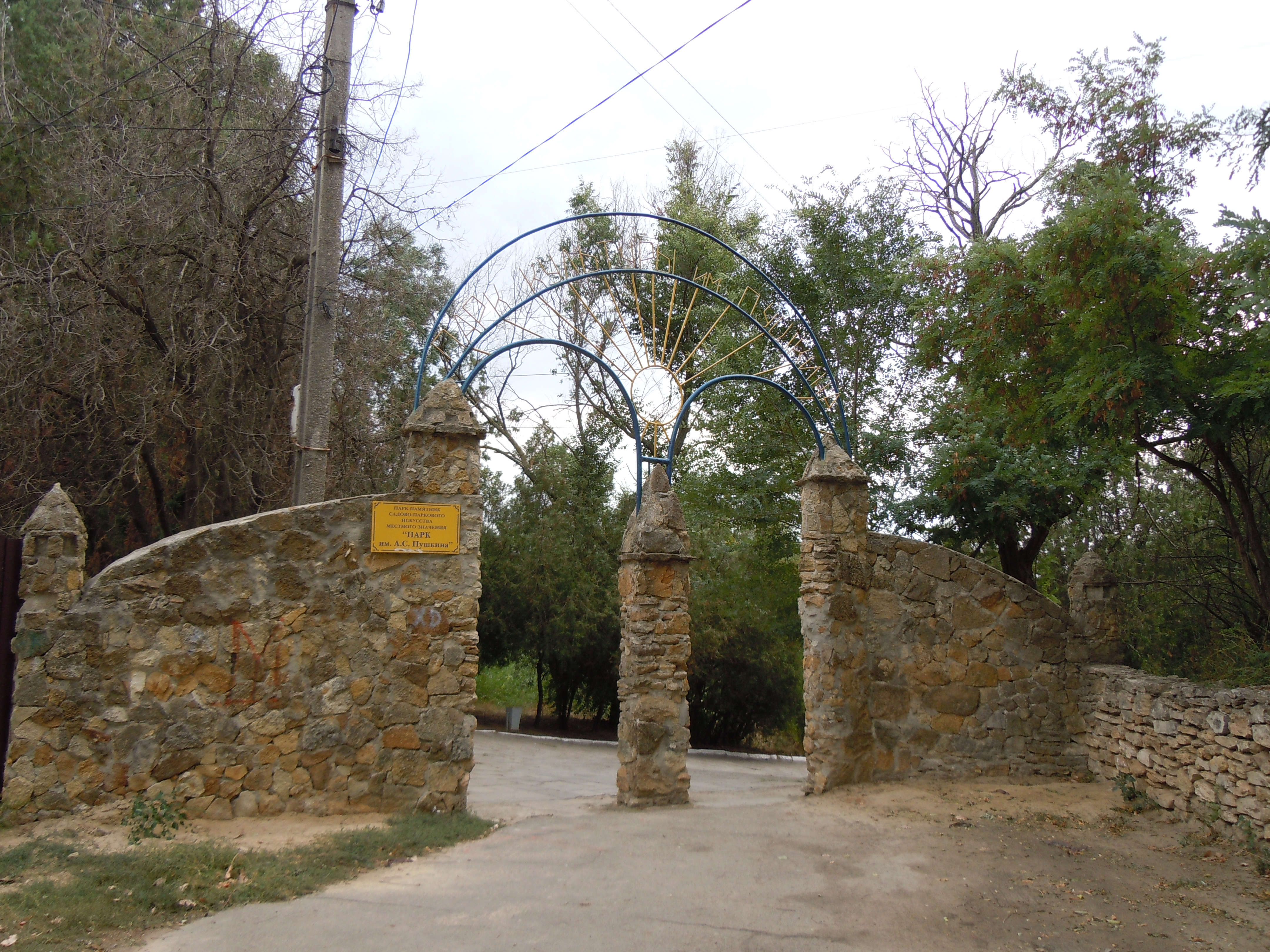 Земський сад, Болград, Міський парк ім. О.С. Пушкіна